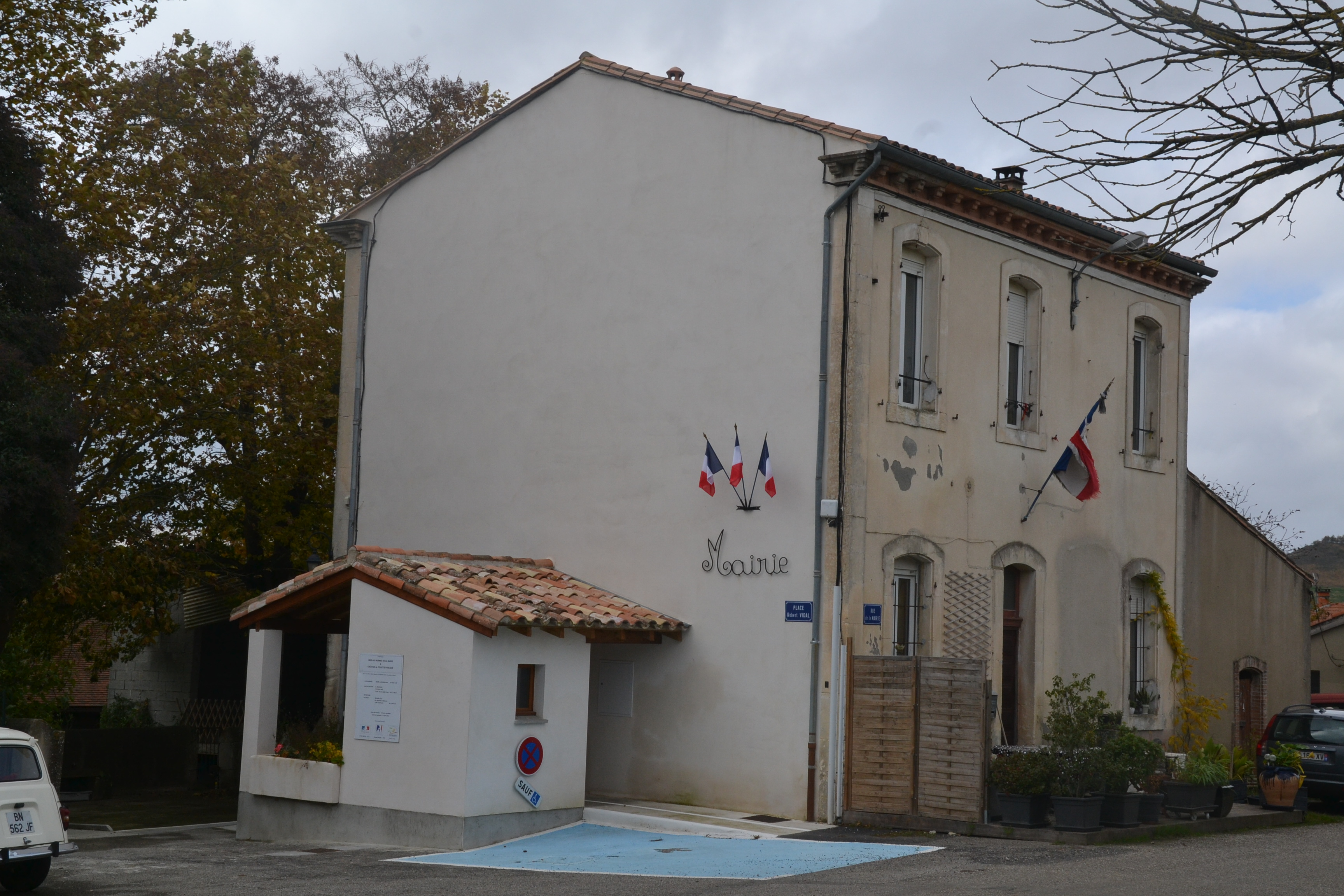 Mairie de Seignalens (Aude, France).